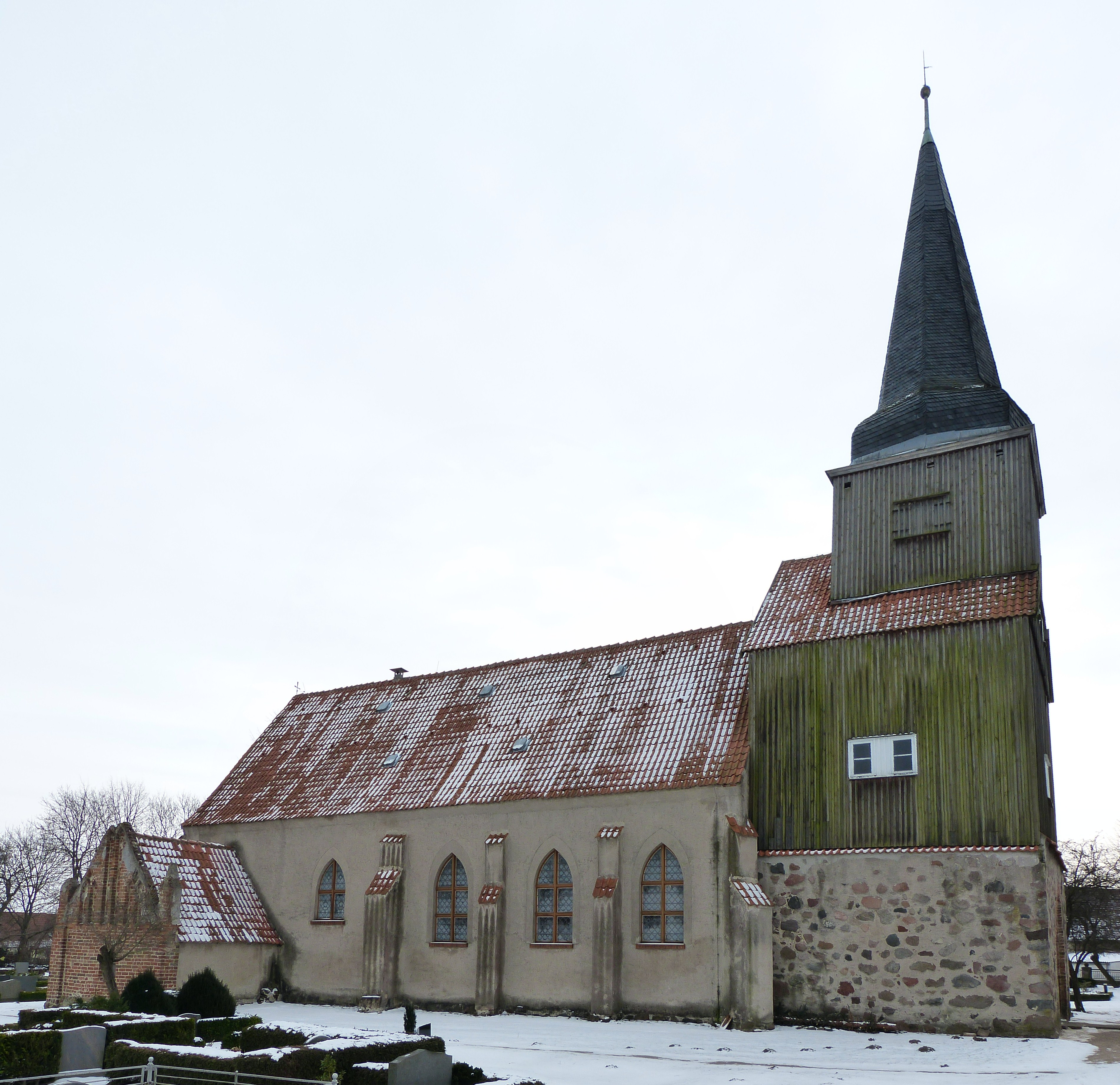 Kirche in Krien, Nordseite